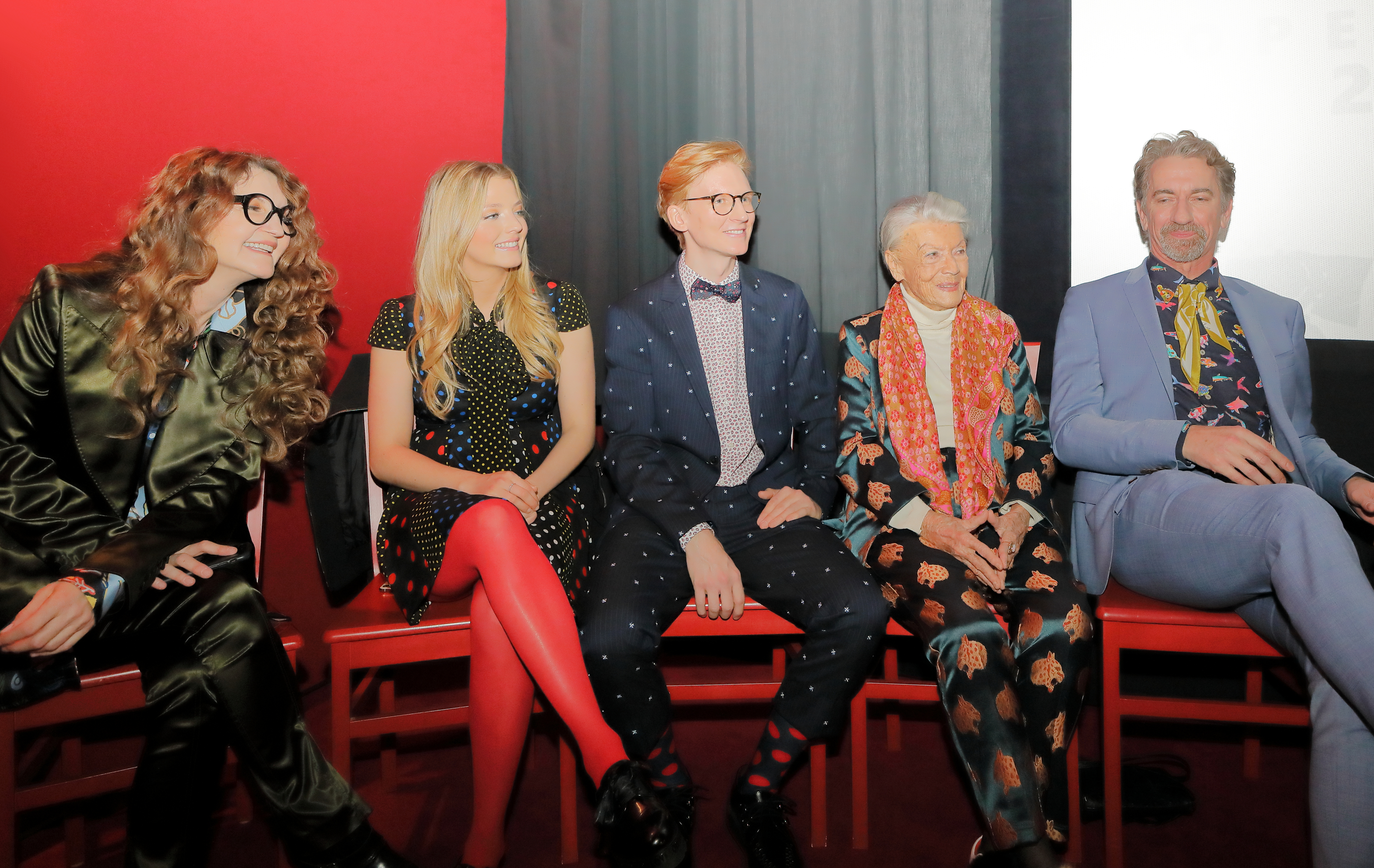 Die TV-Werbe-Familie Putz des österreichischen Möbelhauses XXXLutz bei der Lugner-Pressekonferenz am 13. Feb. 2019 in der Lugner City.Von links nach rechts: Mama Linda Putz (Cecile Nordegg), Ixi (Chiara Pisati), Putzi Putz (Stephan Bauer), Oma Putz (Zdenka Hartmann-Procházková) und Papa Max Putz (Hubert Wolf).